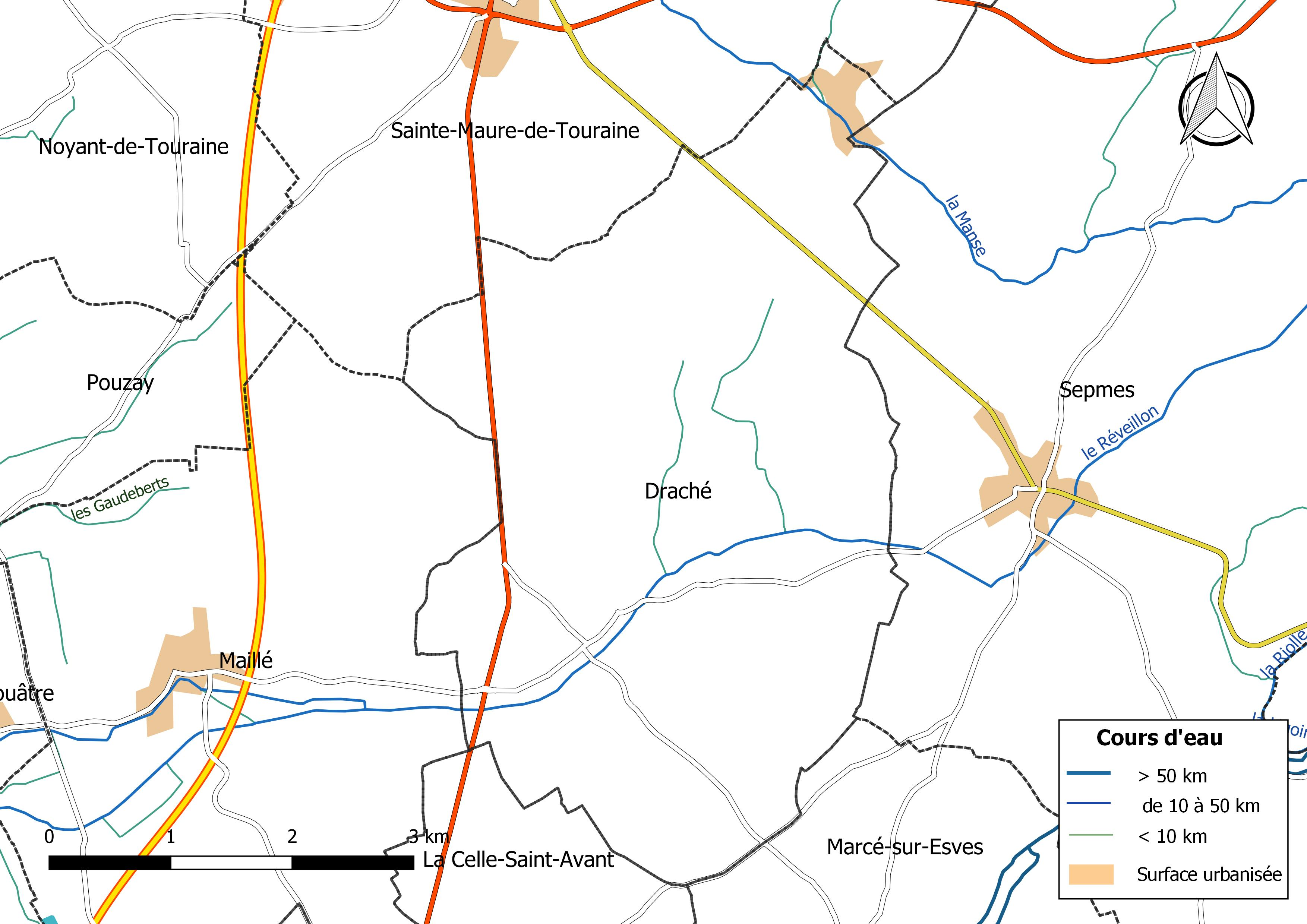 Carte du réseau hydrographique de la commune de Draché (France).